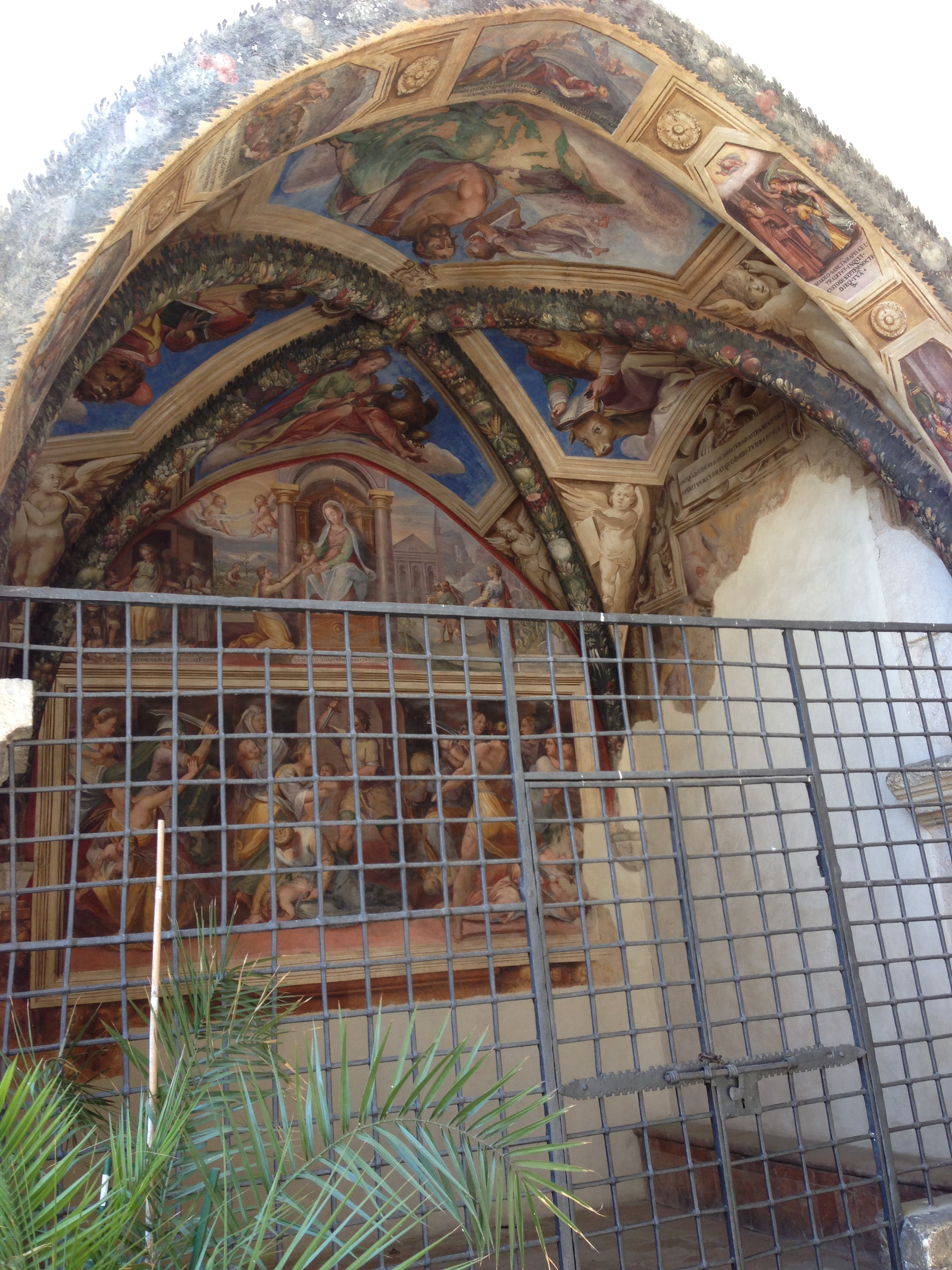 Chiesa di San Gregorio Maggiore. Spoleto. Cappella all'esterno